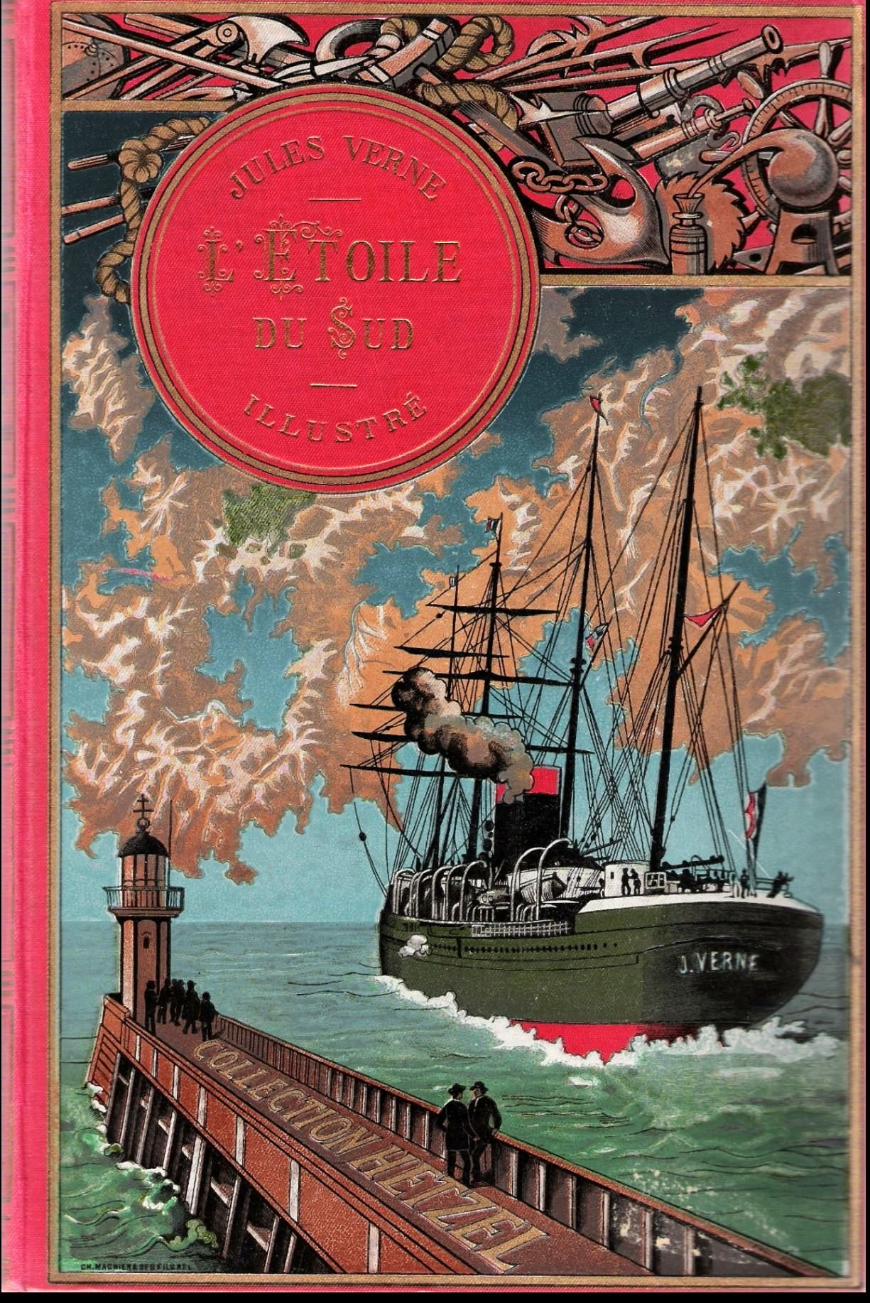 Jules Verne: L’Etoile du Sud von 1895, Einbanddeckel